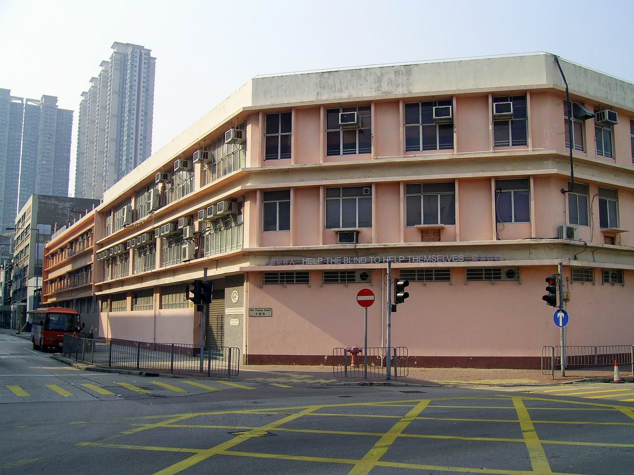 香港盲人輔導會工廠暨庇護工場